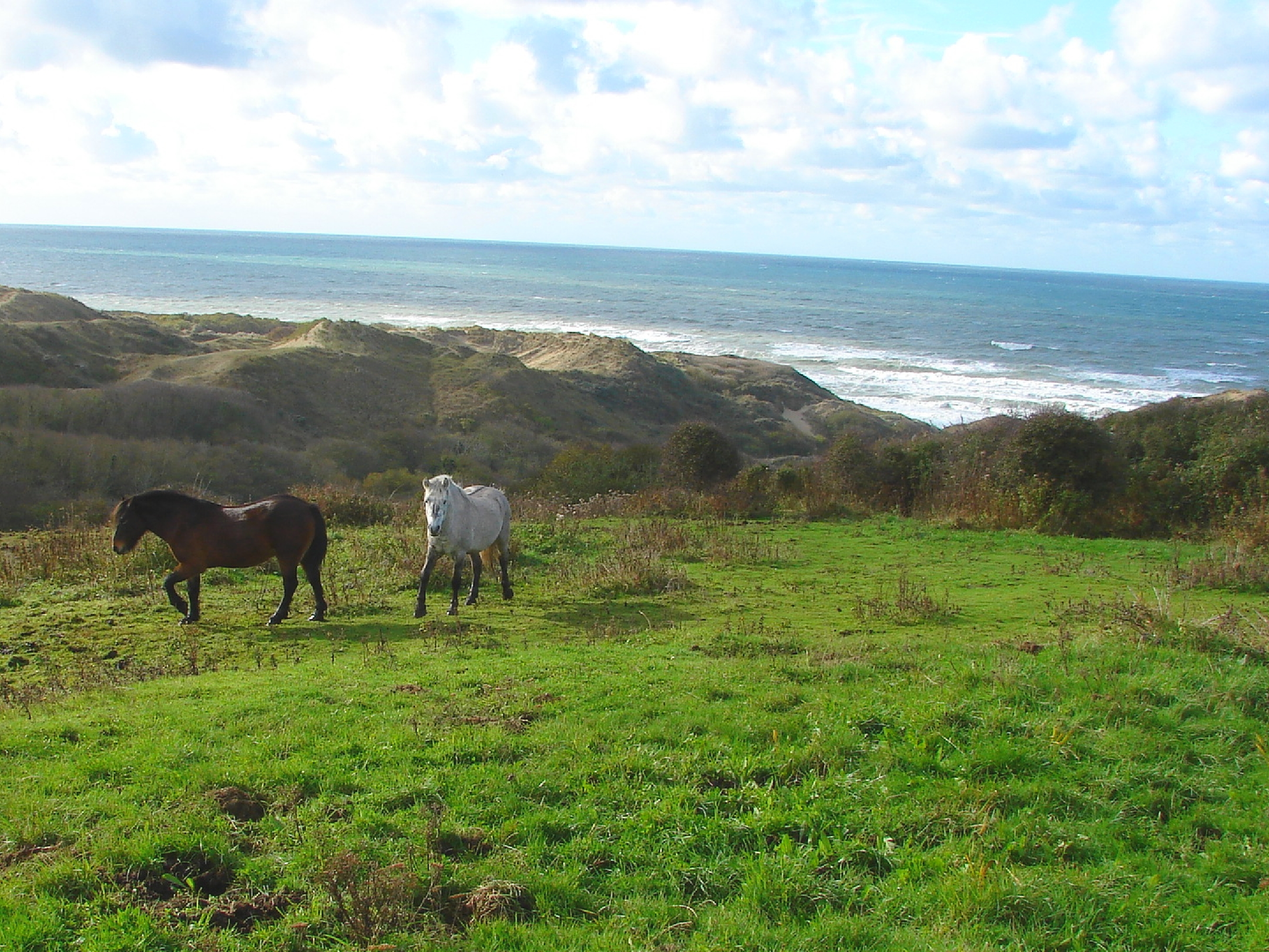 Photo prise à Écault (Pas-de-Calais, France)